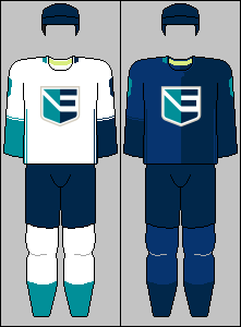 Team Europe jerseys from World Cup of Hockey 2016 ... Big thanks to Realismadder for a large share on these jerseys.